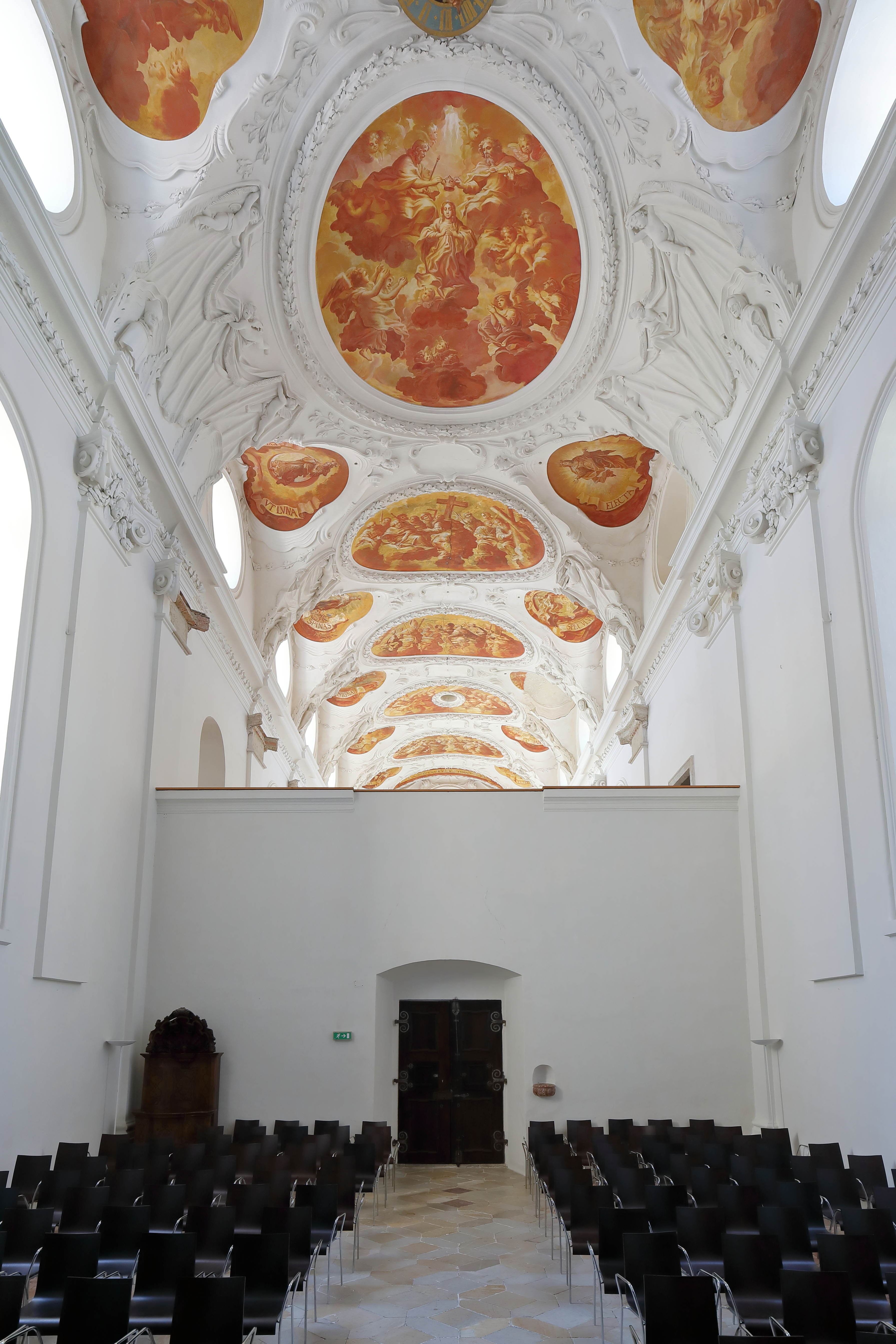 Innenansicht der ehemaligen Klosterkirche der 1782 aufgelösten Kartause in der niederösterreichischen Marktgemeinde Mauerbach.Im Vordergrund der Mönchschor, dann der trennende und querende große Kreuzgang (Kreuzganglettner) und dahinter der Laienbruderchor mit der durchgehenden Decke, die mit Grisaillenmalerei und plastisch ausladendem Stuck versehen ist. Die Klosterkirche wurde ab etwa 1616 neu gebaut, 1683 zerstört und nachher wieder instandgesetzt. Von 1997 bis 1999 erfolgte eine Generalsanierung und ein Rückbau statt.